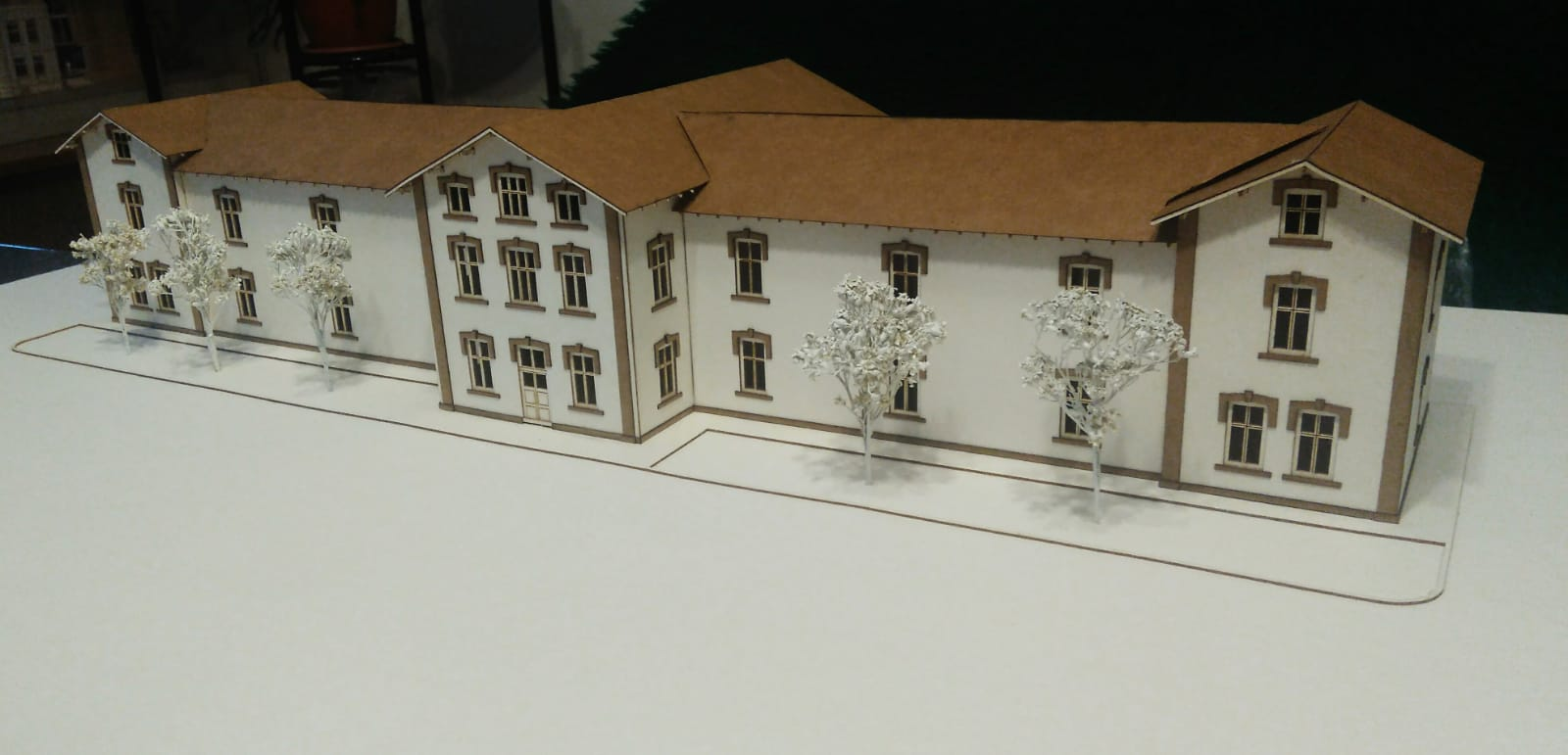 Изглед към парадния вход на централната сграда на Машинното училище при Флота на Негово Величество до 1916 г. Макет. Мащаб 1:100. Автор на макета: арх. Стоян Стамов.